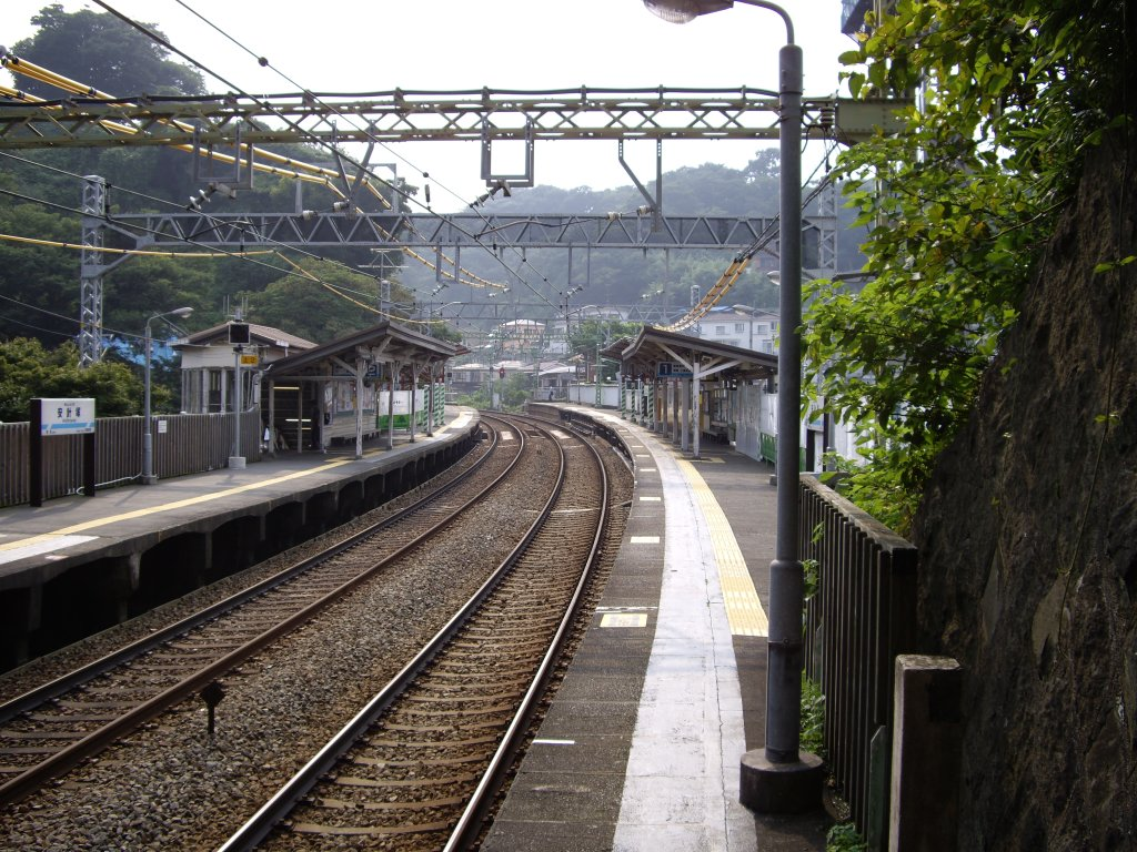 安針塚駅ホームから横浜方向を望む